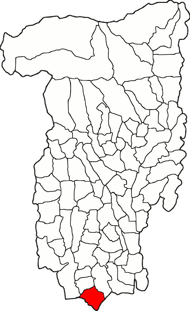 Lage der Gemeinde Laloșu im Kreis Vâlcea (RO).